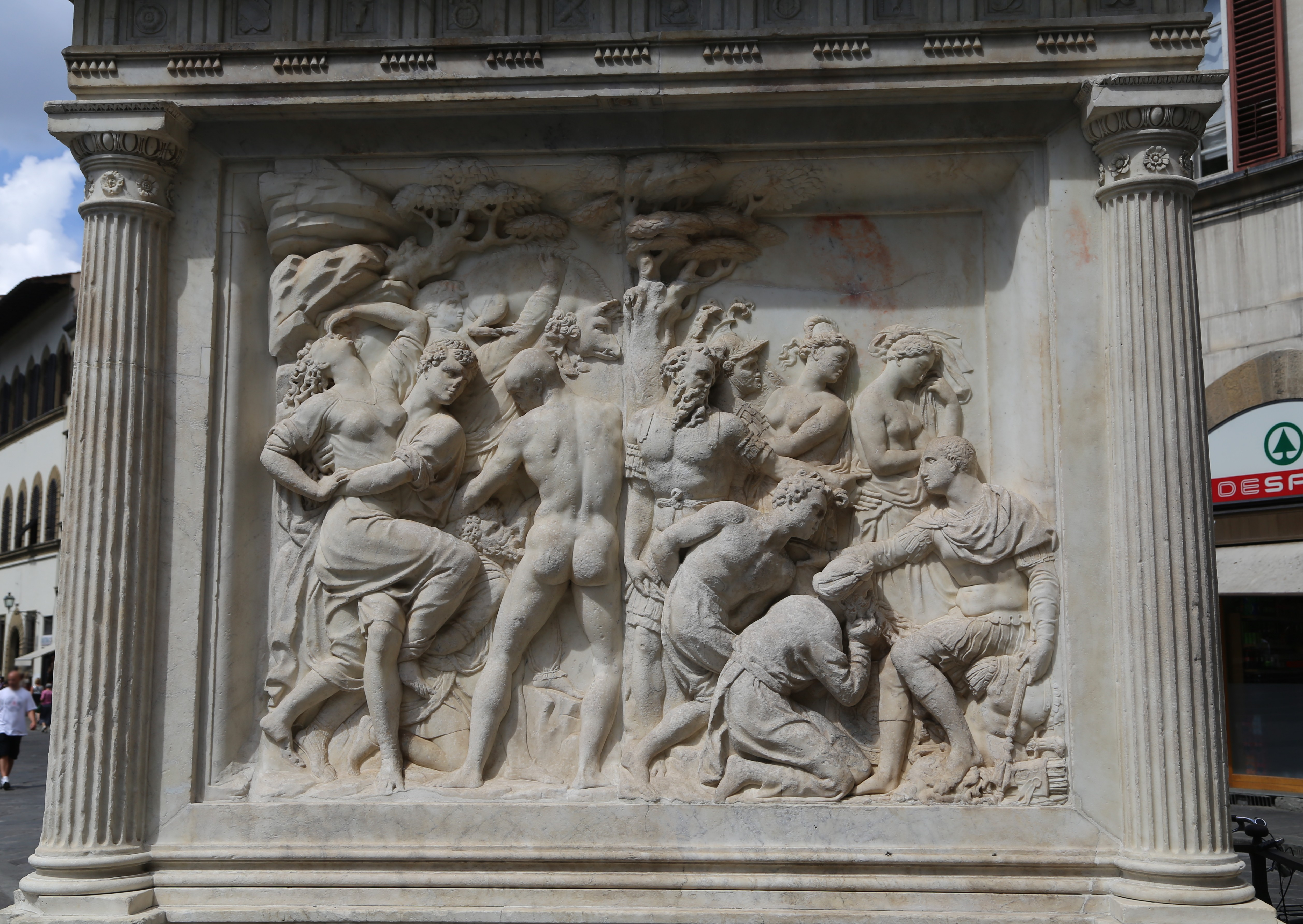 Monument Giovanni delle Bande Nere, Florenz